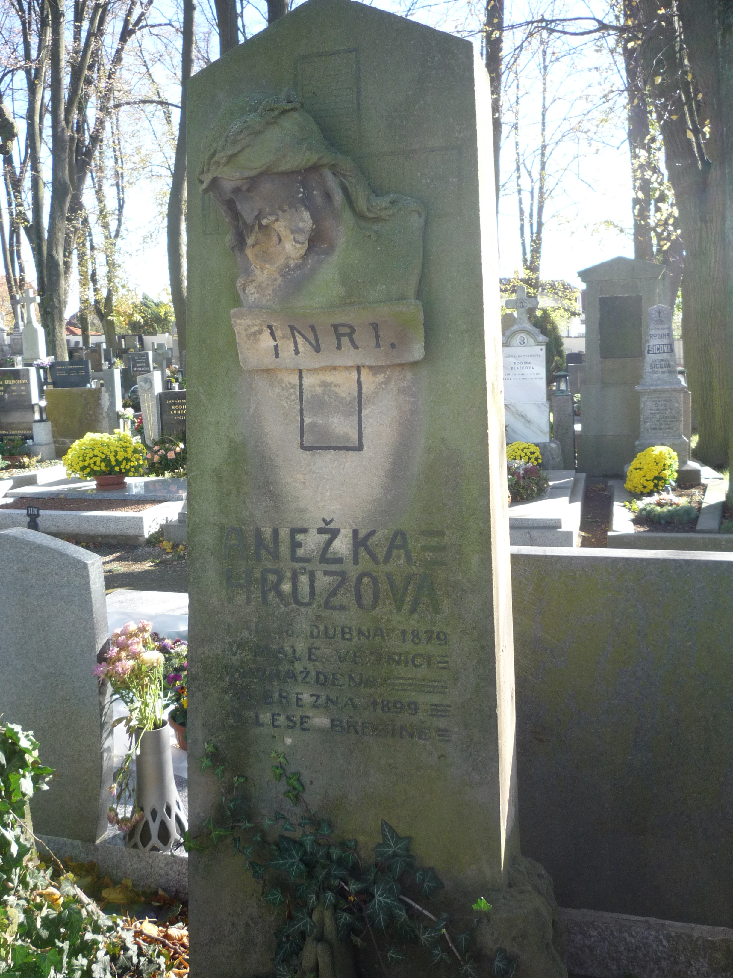 Autor fotogrfie Jiří Zelenka. Pomník Anežky Hrůzové. Hřbotov u kostela Barbory. Polná. Okr.Jihlava. Kraj Vysočina. Czech Republic.